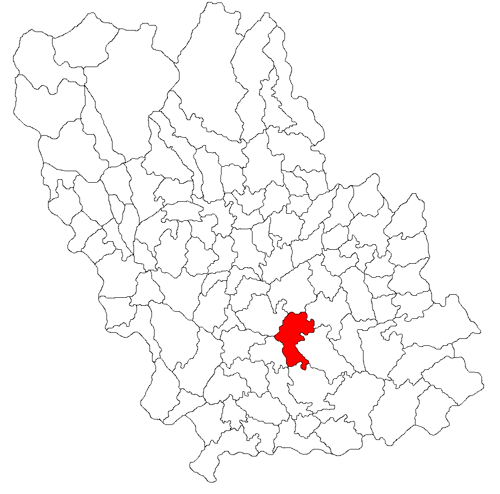 Categorie:Hărţi ale judeţului Prahova